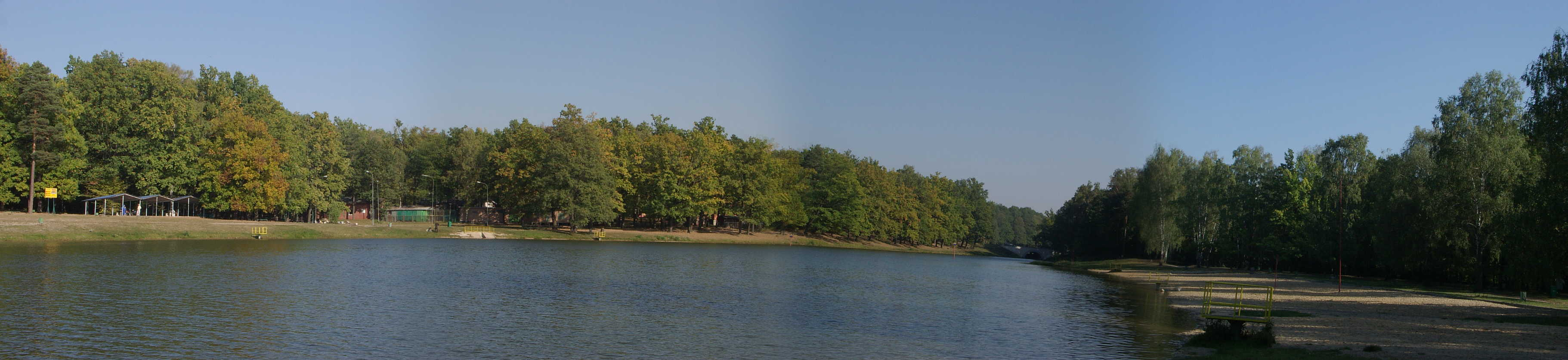 Staw w Arturówku. Pond in Arturówek. author: Bogdan Janus, Łódź, Poland